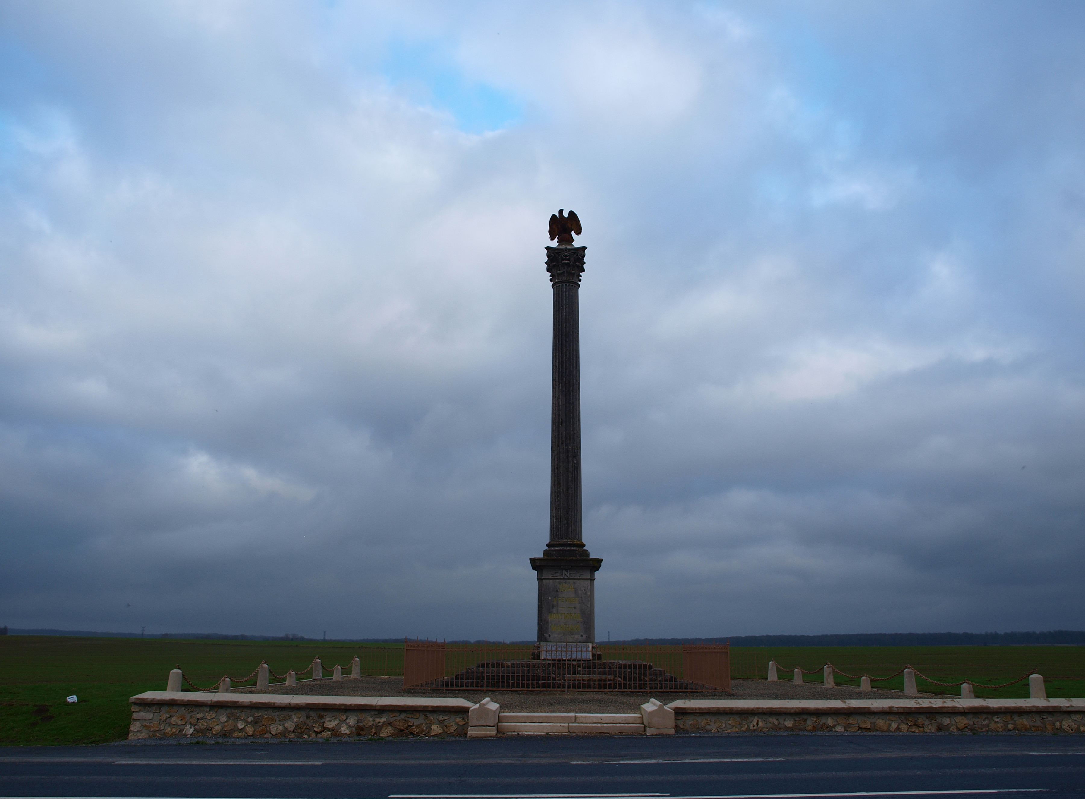 Mémorial des combats de février 1814 à Marchais-en-Brie (Aisne, France)